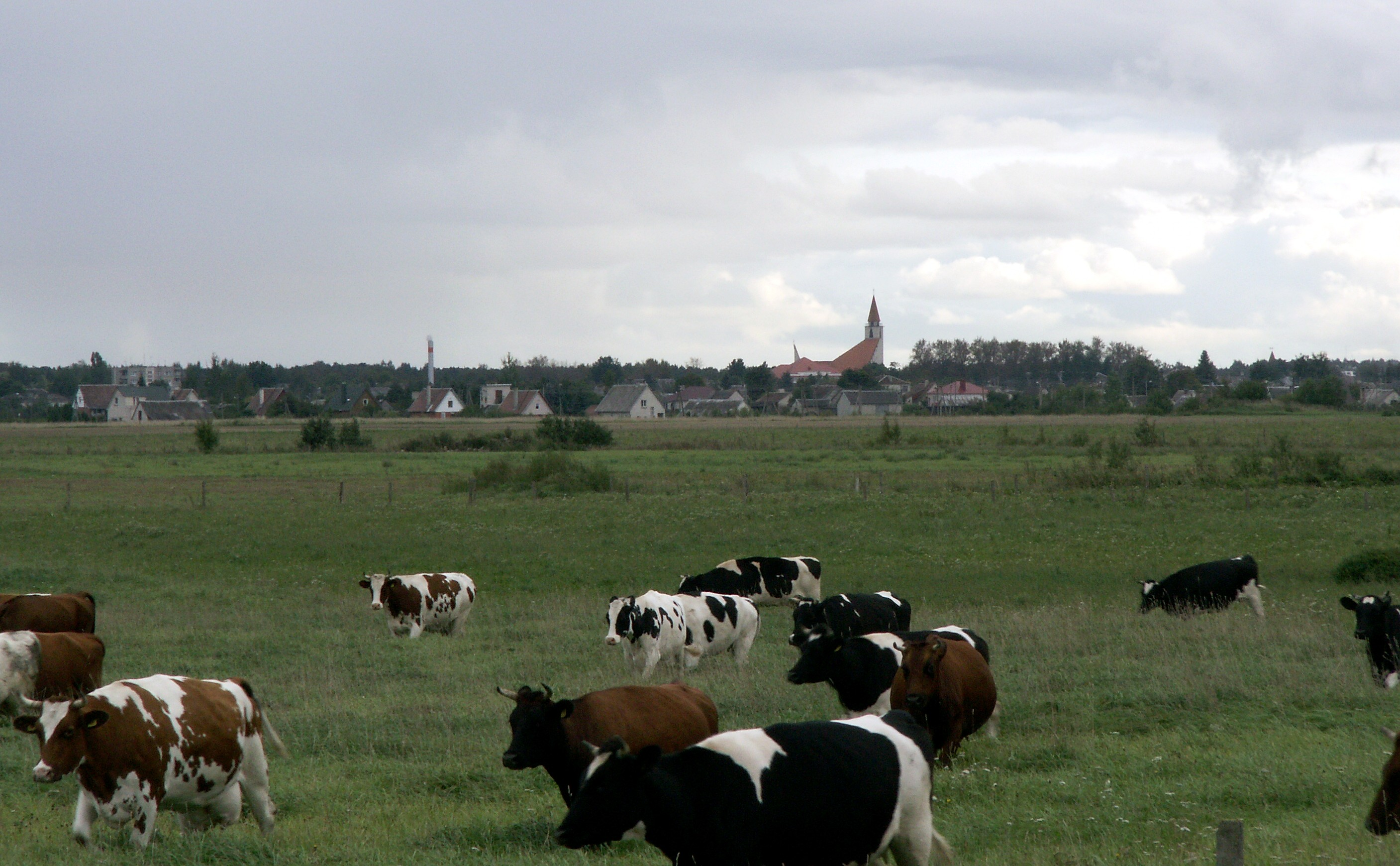 Naujoji Akmenė, Lietuva